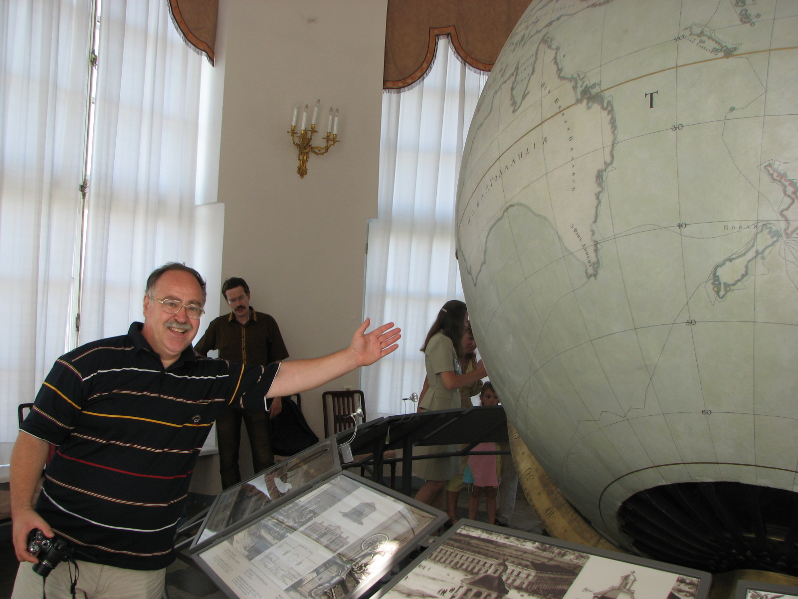 До един от най-големите глобуси в света - Музей Кунцкамера, Санкт Петербург